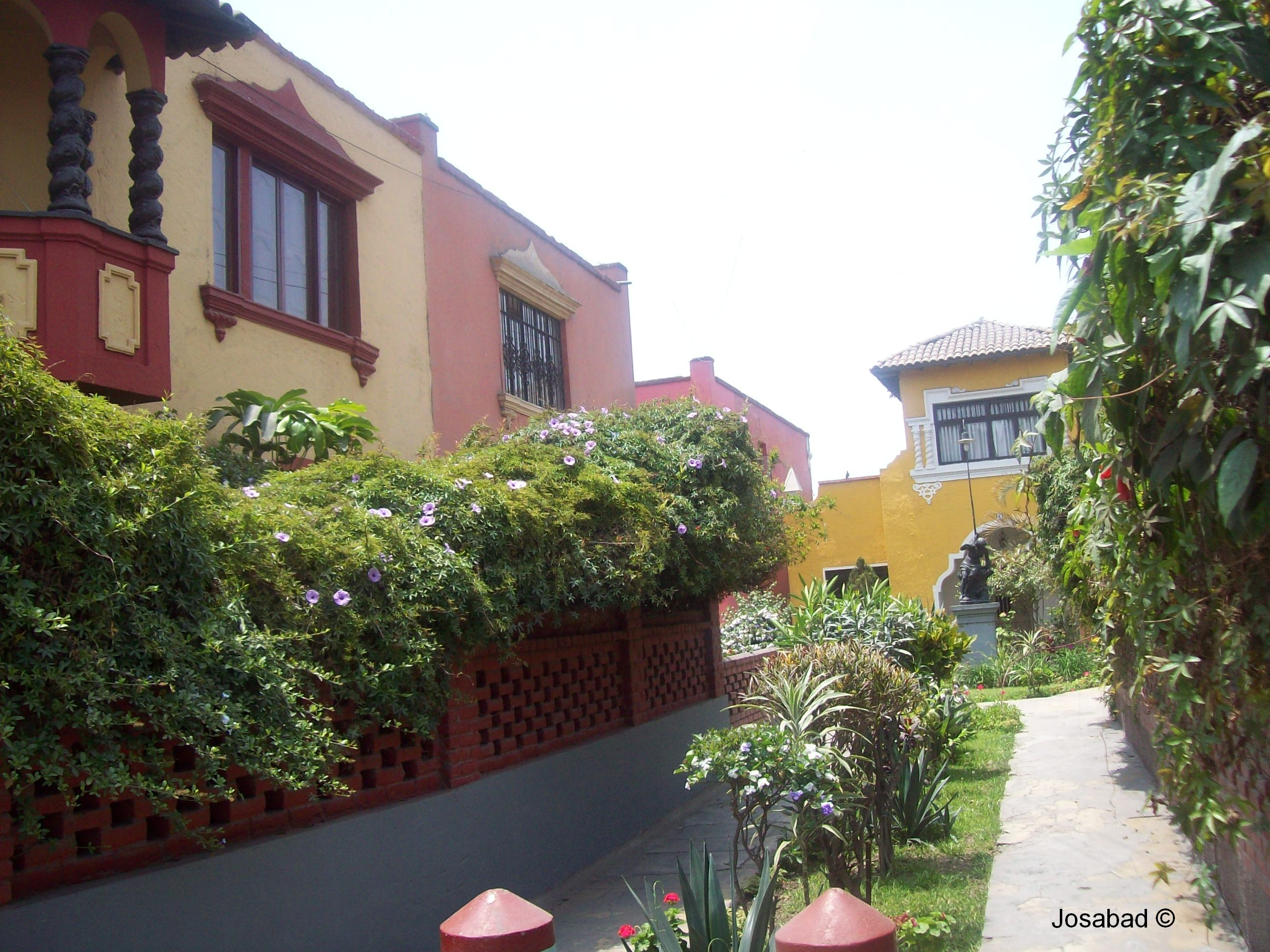 Entrada de la quinta de la cuarta cuadra de la Avenida República de Portugal. Tiene un estilo "colonial moderno"